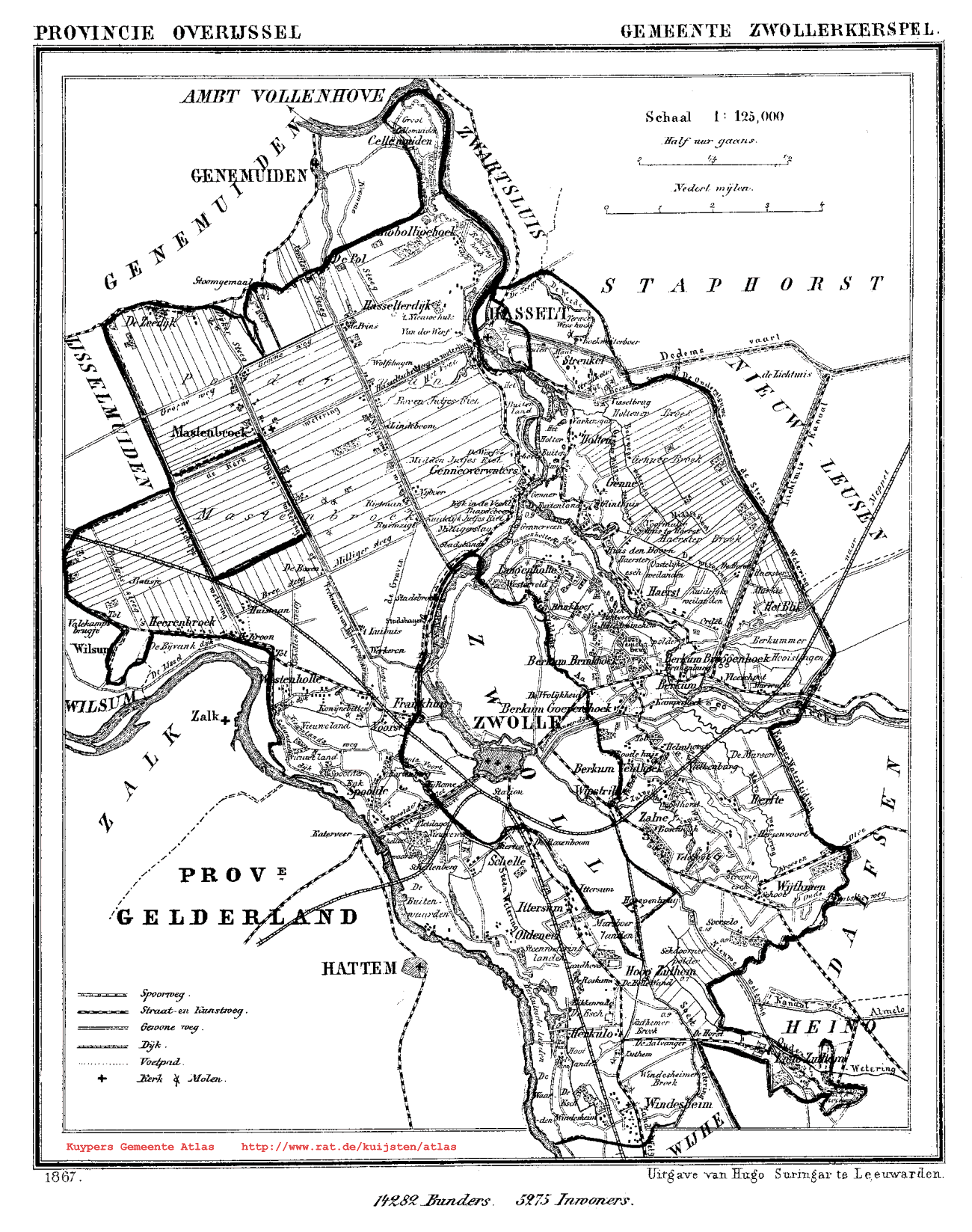 Kaart van Zwollerkerspel uit Gemeente Atlas van Nederland, J. Kuyper 1865-1870, Uitgave Hugo Suringar Leeuwarden.